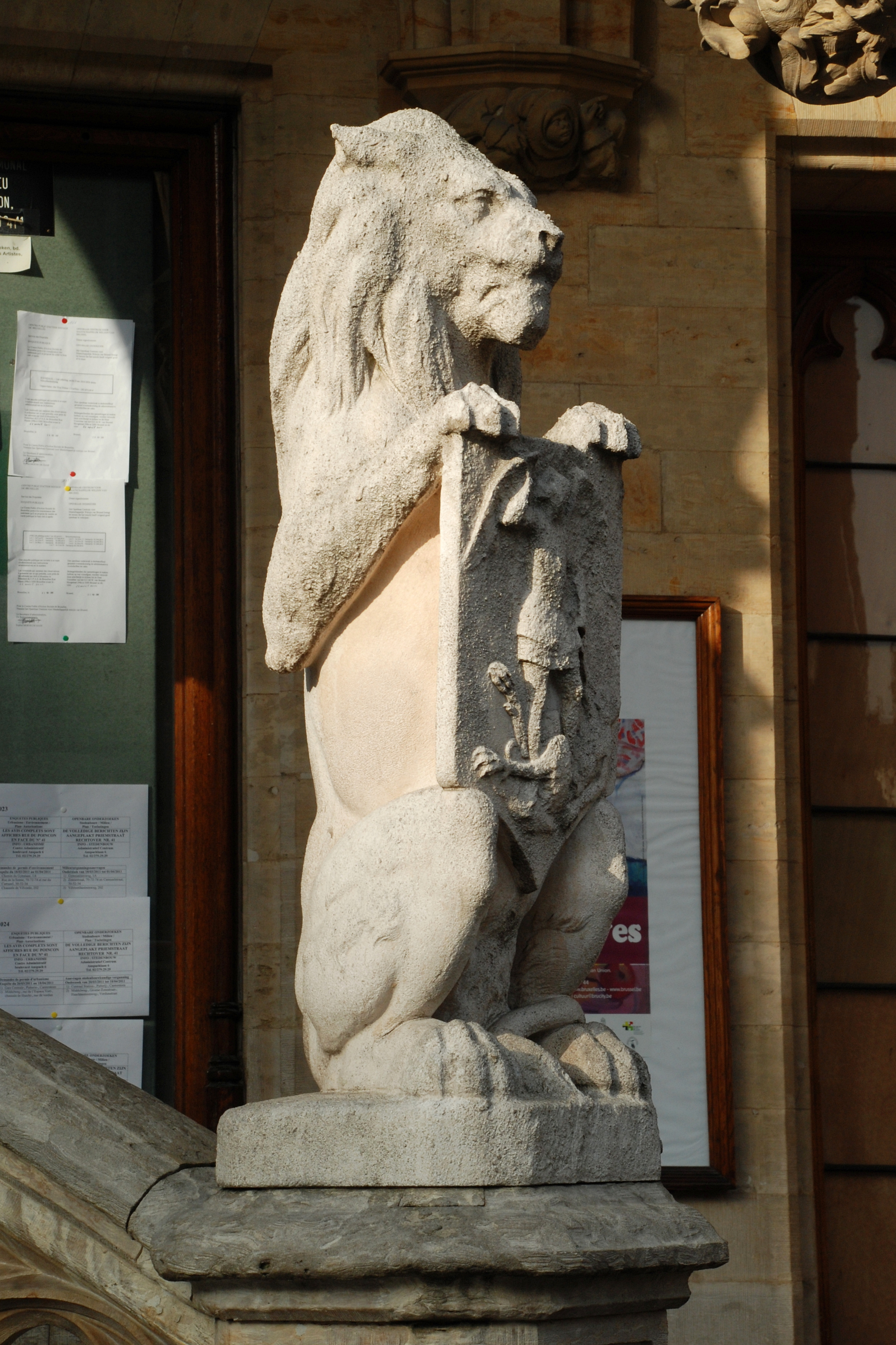 Belgique - Bruxelles - Hôtel de ville de Bruxelles - Perron - Lion